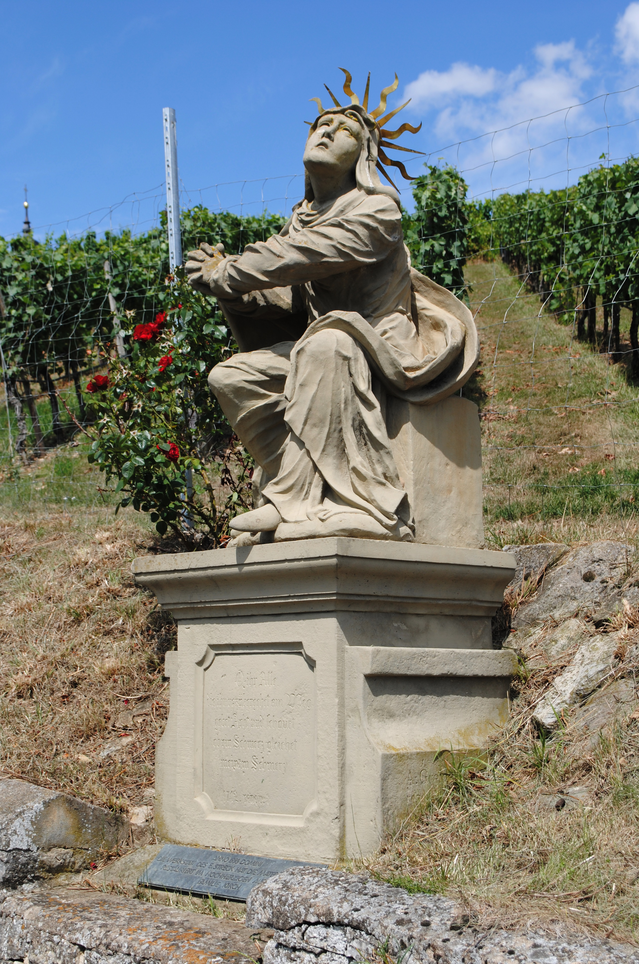 Mater dolorosa, Kirchberg, Volkach